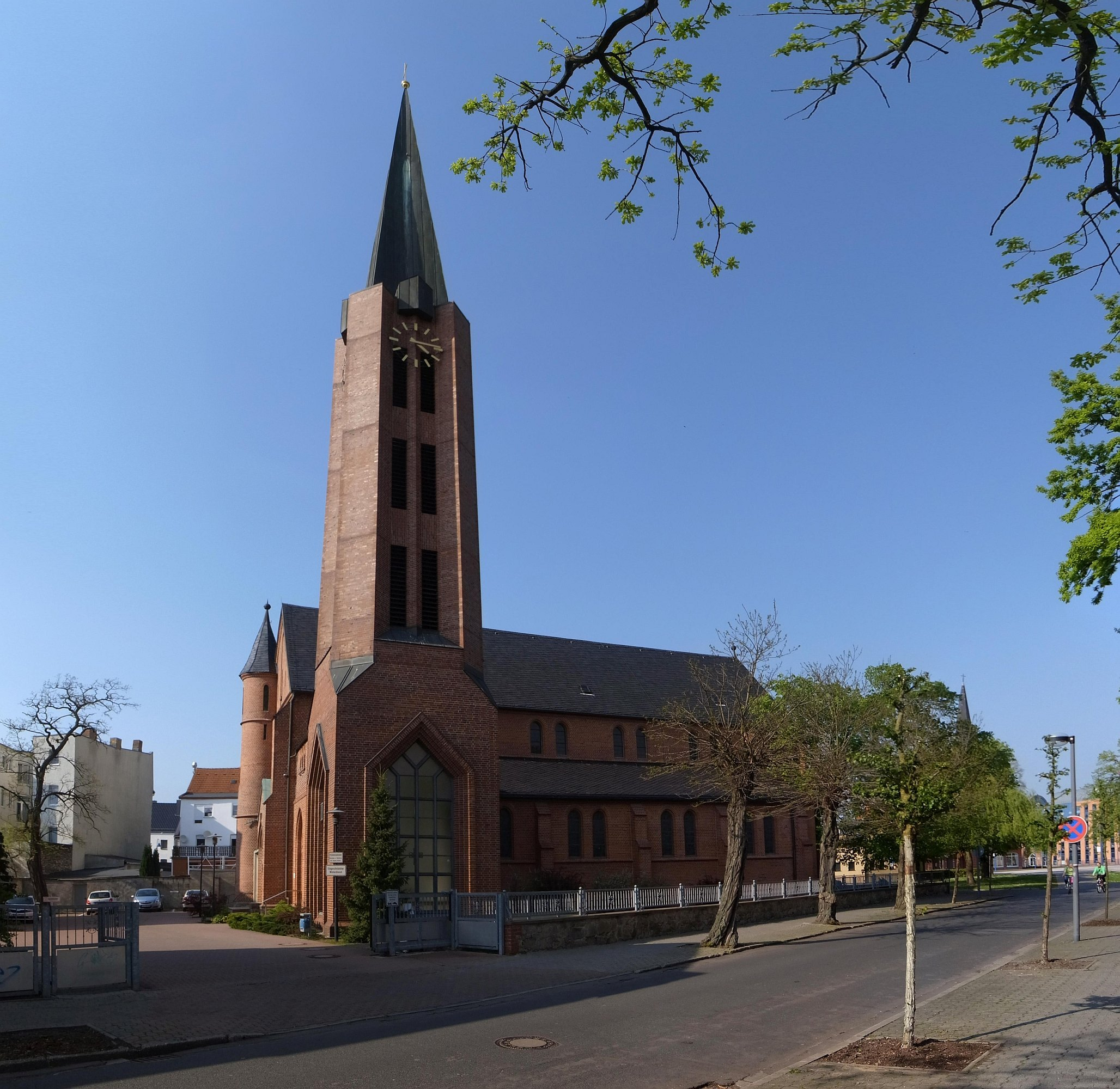 Bitterfeld, Pfarrkirche Herz Jesu (Baudenkmal im Denkmalverzeichniss Sachsen-Anhalt, Erfassungsnummer: 094 95335 000 000 000 000 [1])